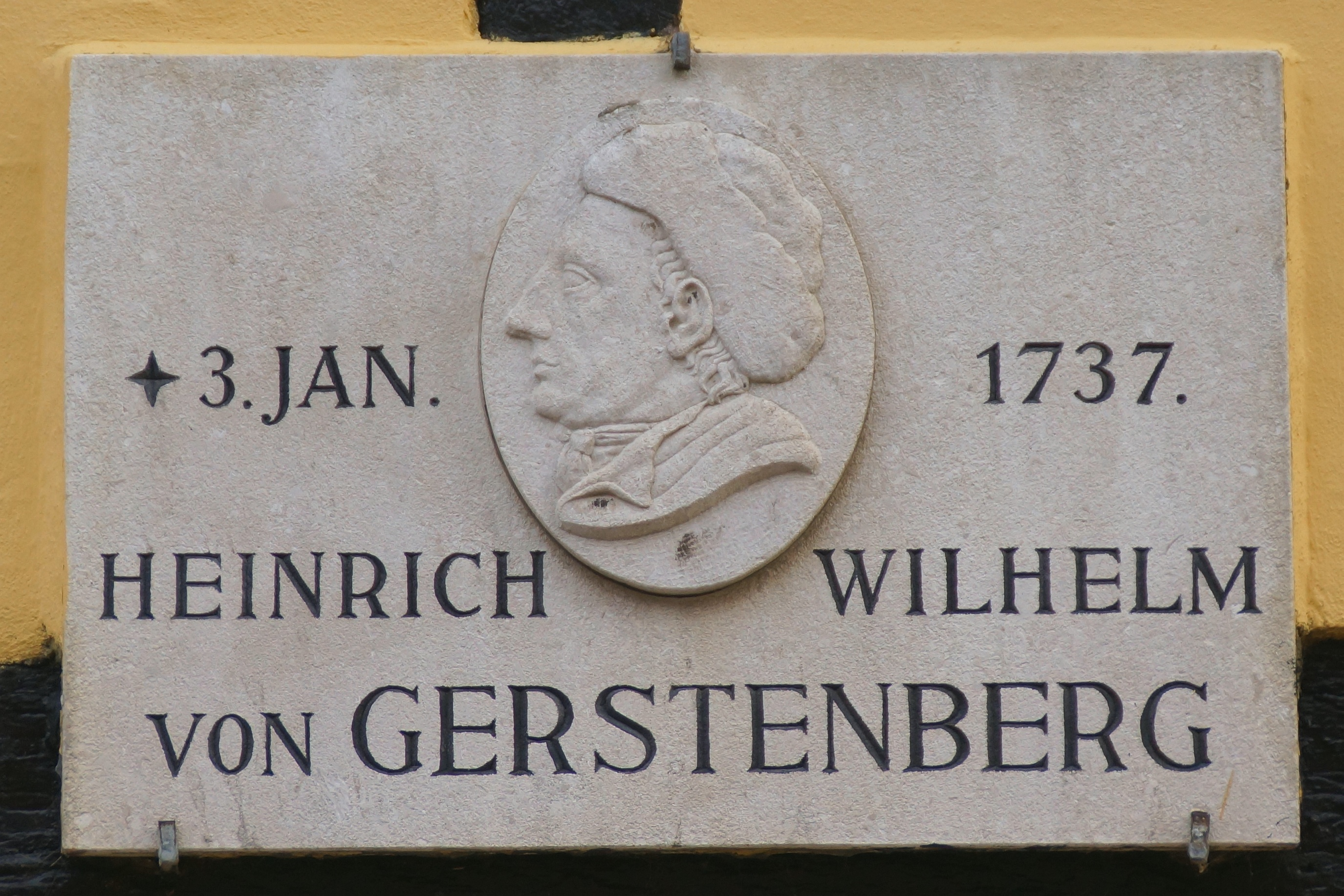 Wandtafel am Geburtshaus von Heinrich Wilhelm von Gerstenberg, Søndergade, Tønder, Sønderjylland, Danmark. Foto Wolfgang Pehlemann DSC00621